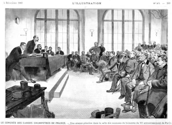 Congrès organisé à la mairie du 6ème arrondissement de Paris en 1903